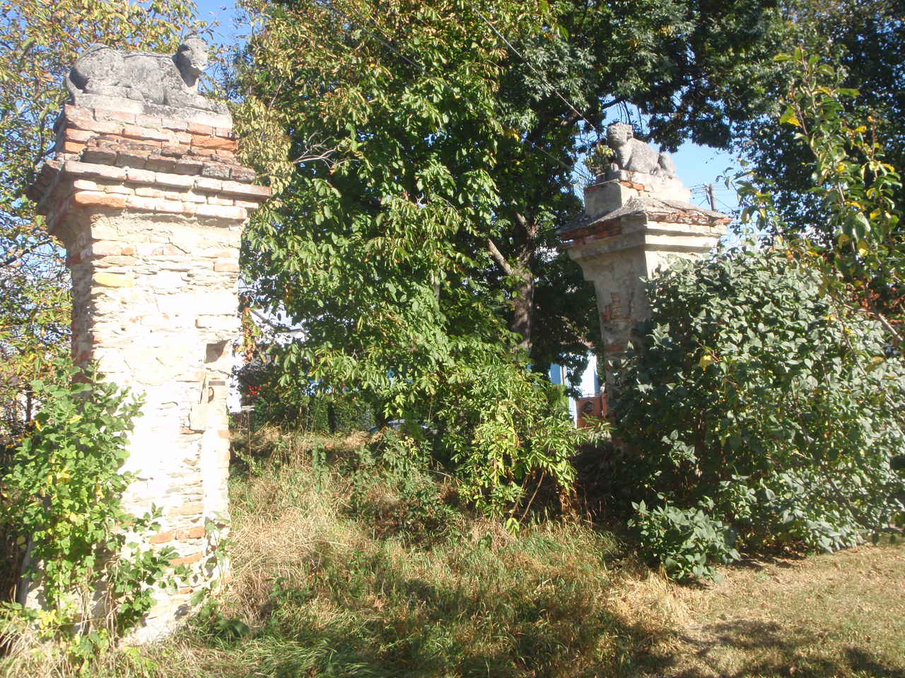 Bozsok Rákóczi út 101. a volt Batthyány-kastély egykori kapuja